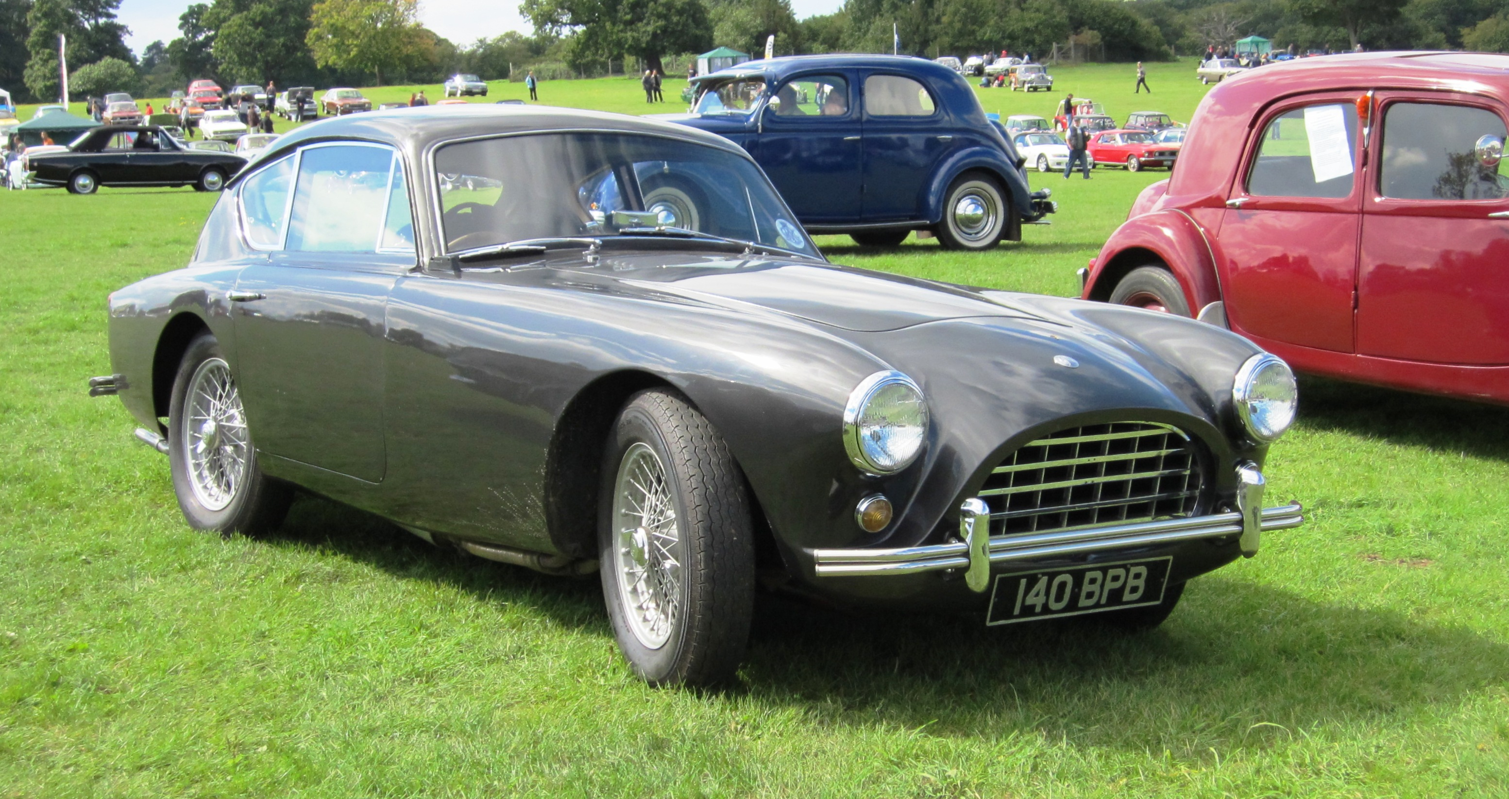 AC Aceca from the period when the car was still fitted with AC's own 1991cc engine